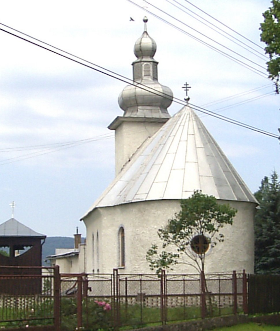 Medzilaborce-Vydraň, Gréckokatolícky kostol